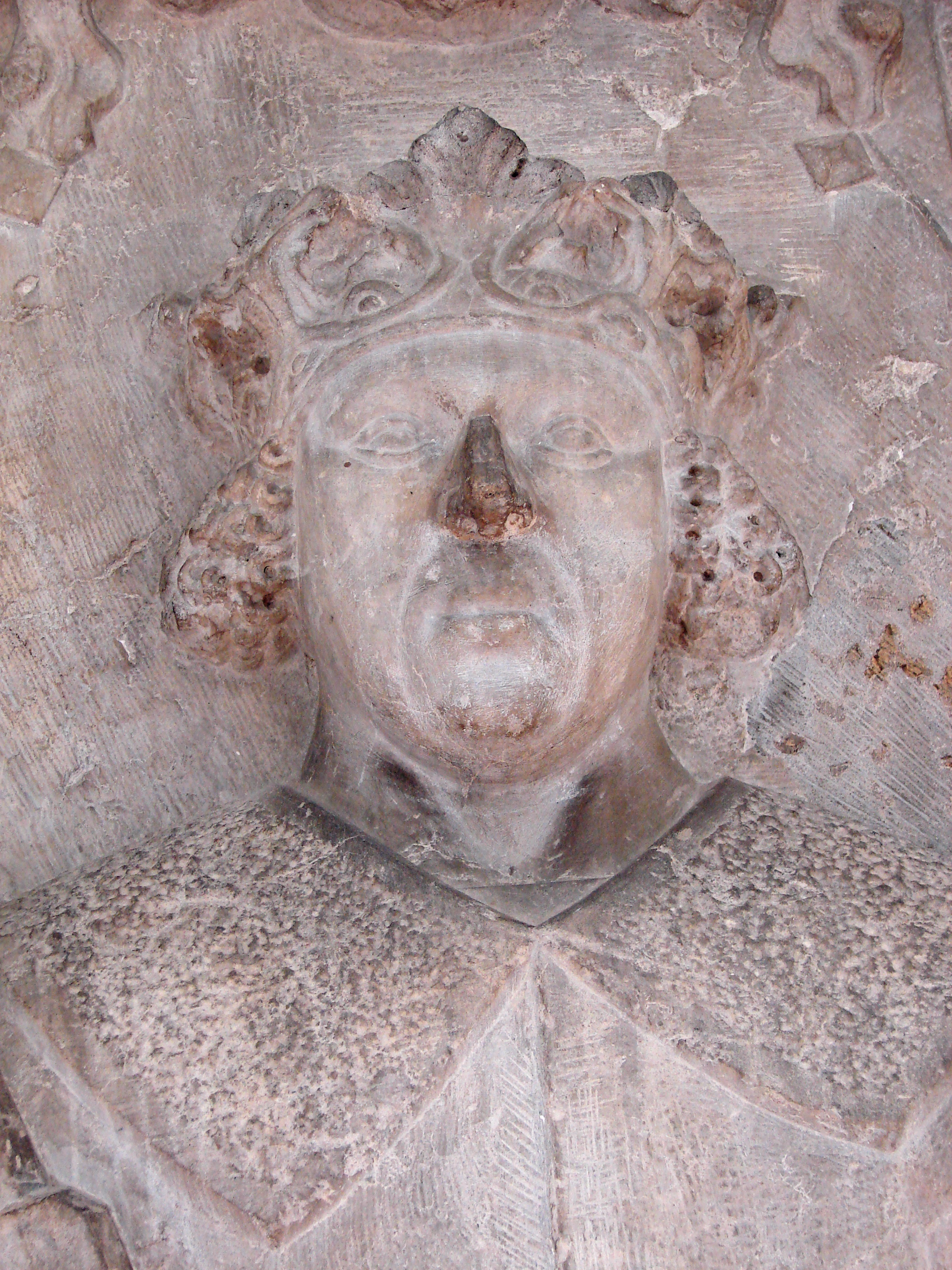 Kong Hans af Danmark, Norge og Sverige, bislagssten ved den udvendige trappe til Riddersalen på middelalderens Københavns Slot, 1503 af Adam van Düren, hugget i gotlandsk kalksten, Nationalmuséet i København